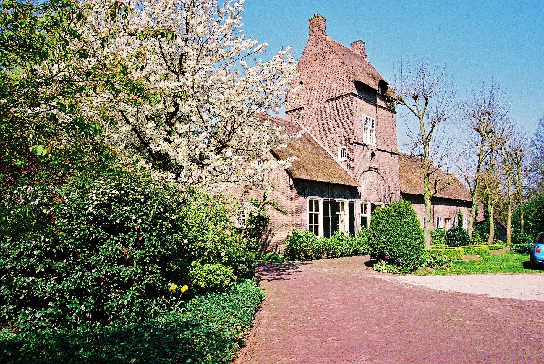 Poortgebouw van het verdwenen kasteel Gageldonk te Breda.